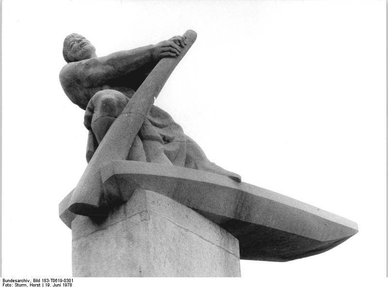 Magdeburg, Plastik Zm Beitrag: Fährmann, hol über-Die Fährstellen in der Elbestadt Magdeburg ADN-ZB Sturm 19.6.78 Plastik des Fährmanns an Magdeburgs Elbuferpromenade. Die fünf Meter hohe Stale an der Kaimauer ist eine der zahlreichen Skulpturen, die die malerische Anlage schmücken. Hoch über dem Strom, sinnbildlich jeder Flut trotzend, trägt sie in einem stilisierten Nachen die überlebensgroße Gestalt des Fährmanns. Schöfer dieser Plastik ist der Bildhauer Eberhard Roßdeutscher, für den die Geste des Übersetzens eine friedliche, völkerverbindende Symbolik hat. "Arbeit , Handel und Kultur über Jahrhunderte, über natürliche wie über Ländergrenzen." (Beachten Sie hierzu auch T0619-300N, 302N-304N)